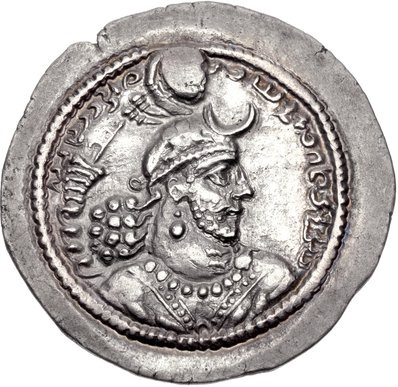 Dracma do xá sassânida Izdegerdes I